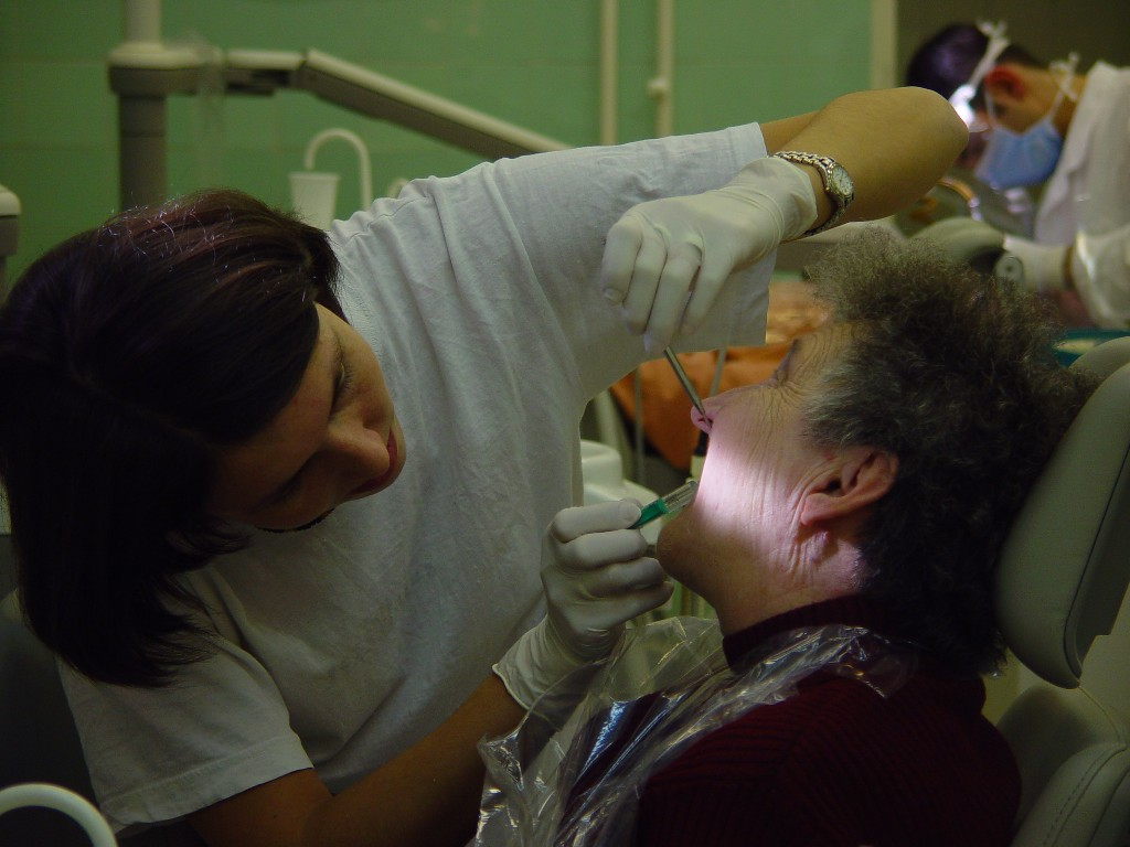 Egy fogorvos és páciense